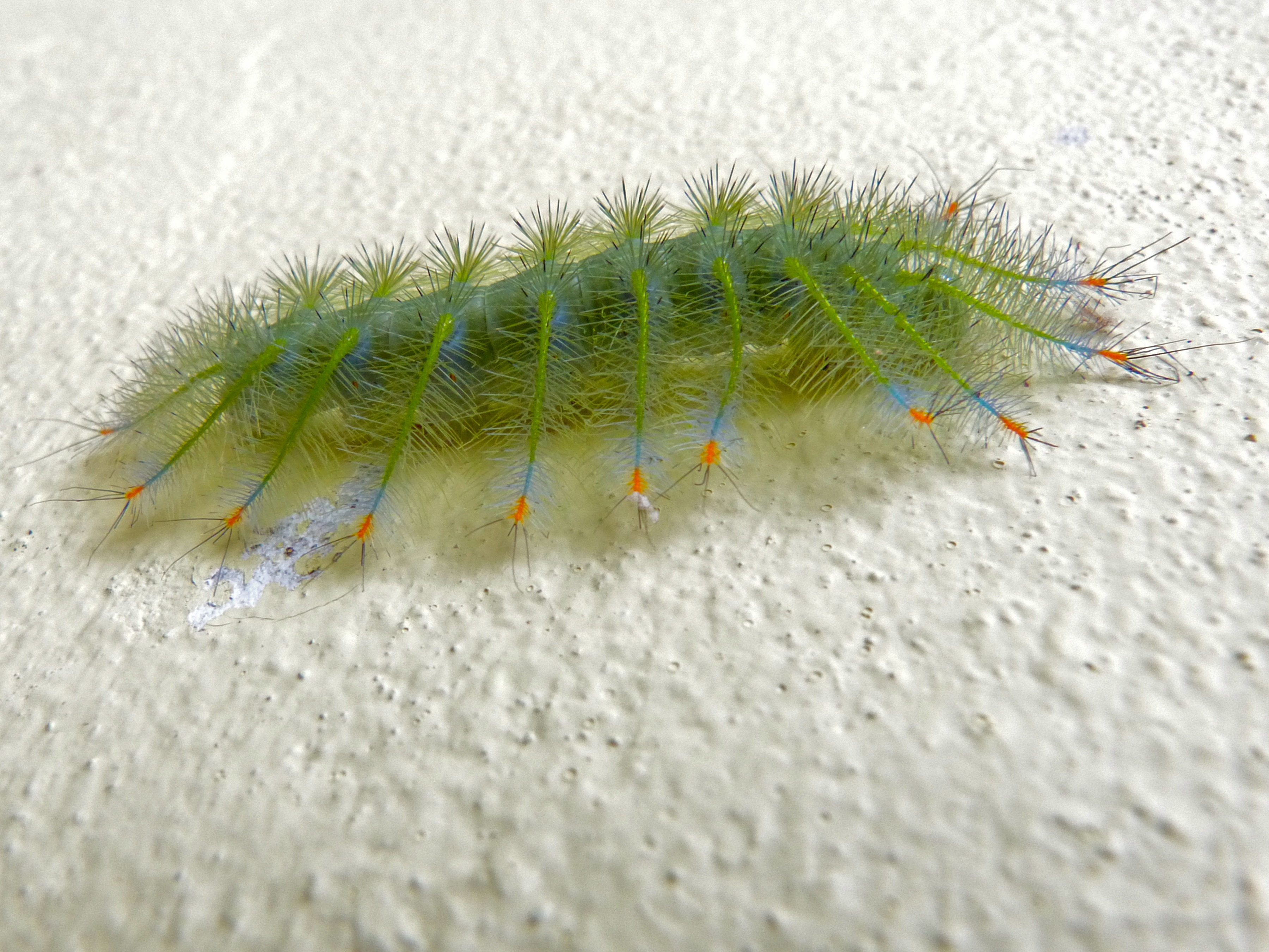 Gunung Mulu NP, Sarawak, MALAYSIA